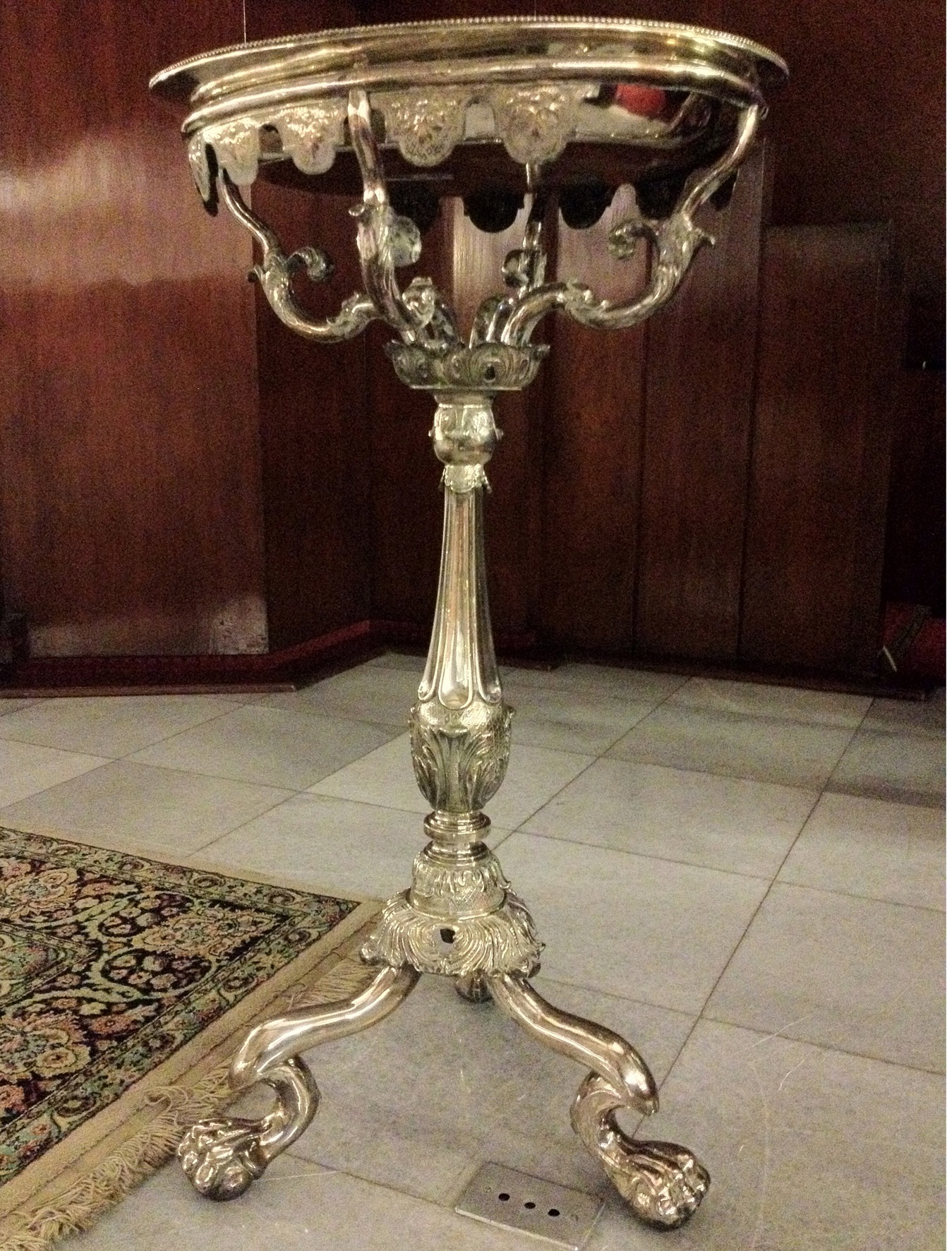 GPIB Paulus